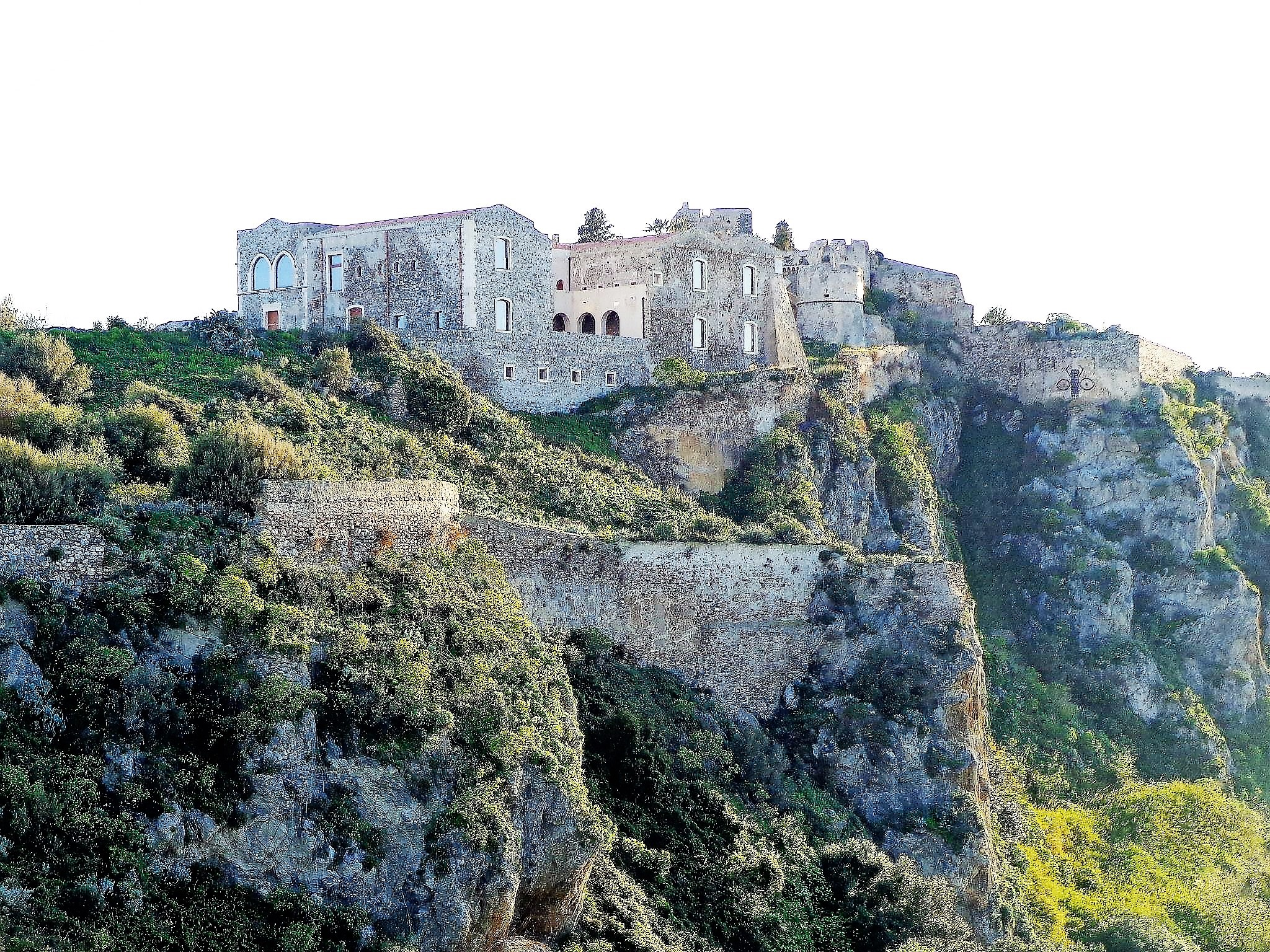 Fortificazioni, monastero delle Benedettine e Scarabeo. Foto d'archivio. Scatto già presente su Facebook e altre pagine personali.